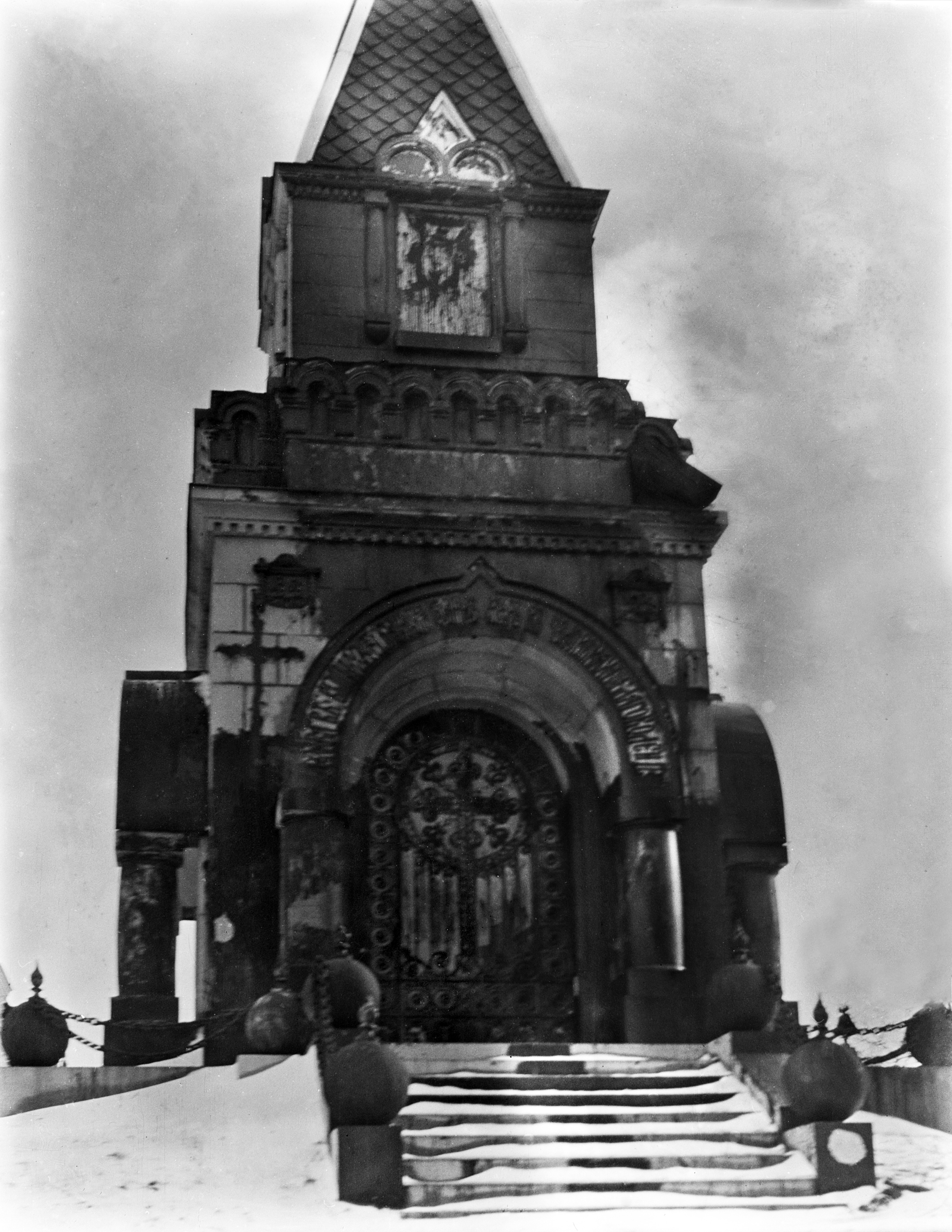 Resvoyn Rauhan kappeli tervattuna Uspenskin katedraalin edustalla.; negatiivi, nitraatti, mv